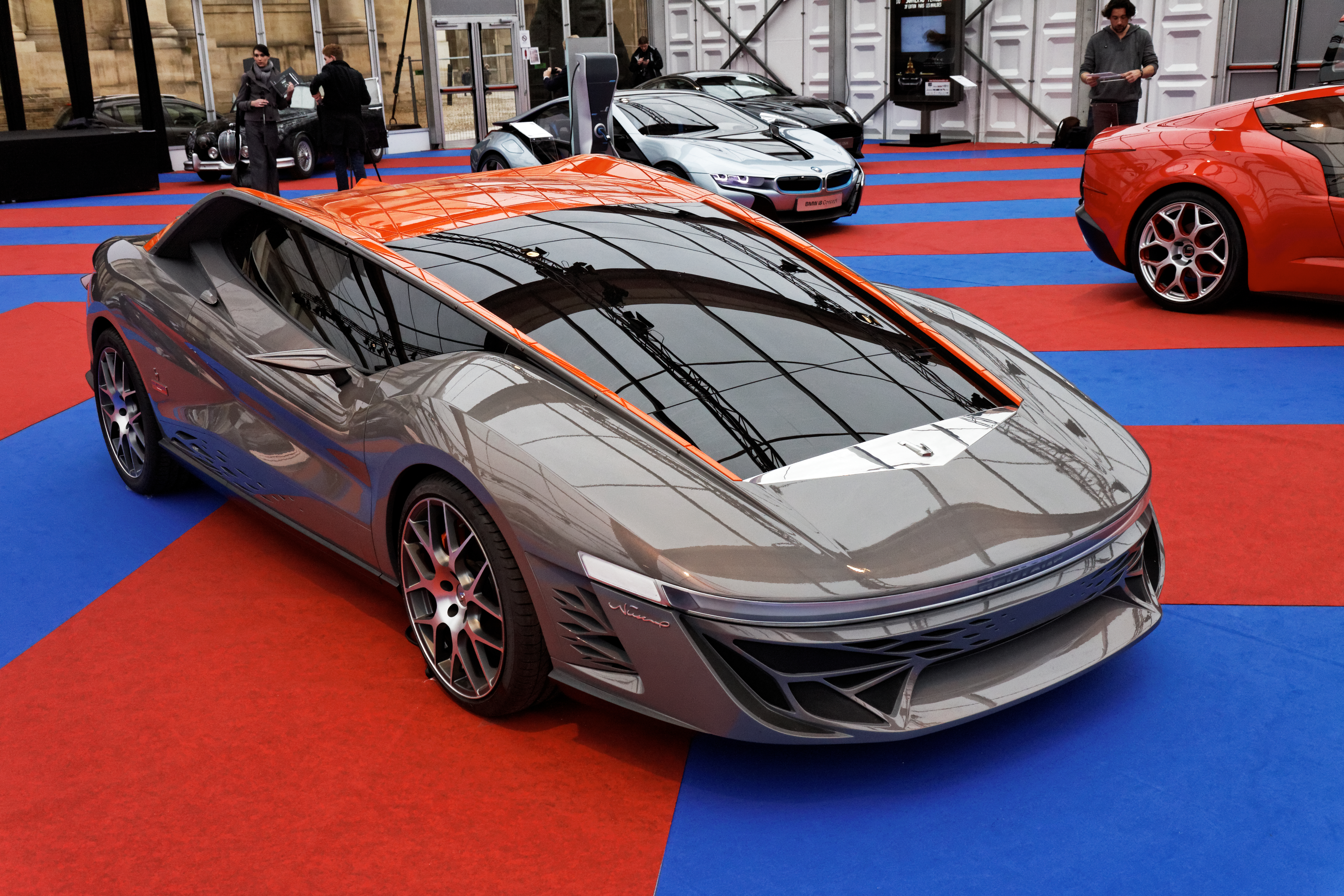 Une Bertone Nuccio exposée lors du festival automobile international 2013.